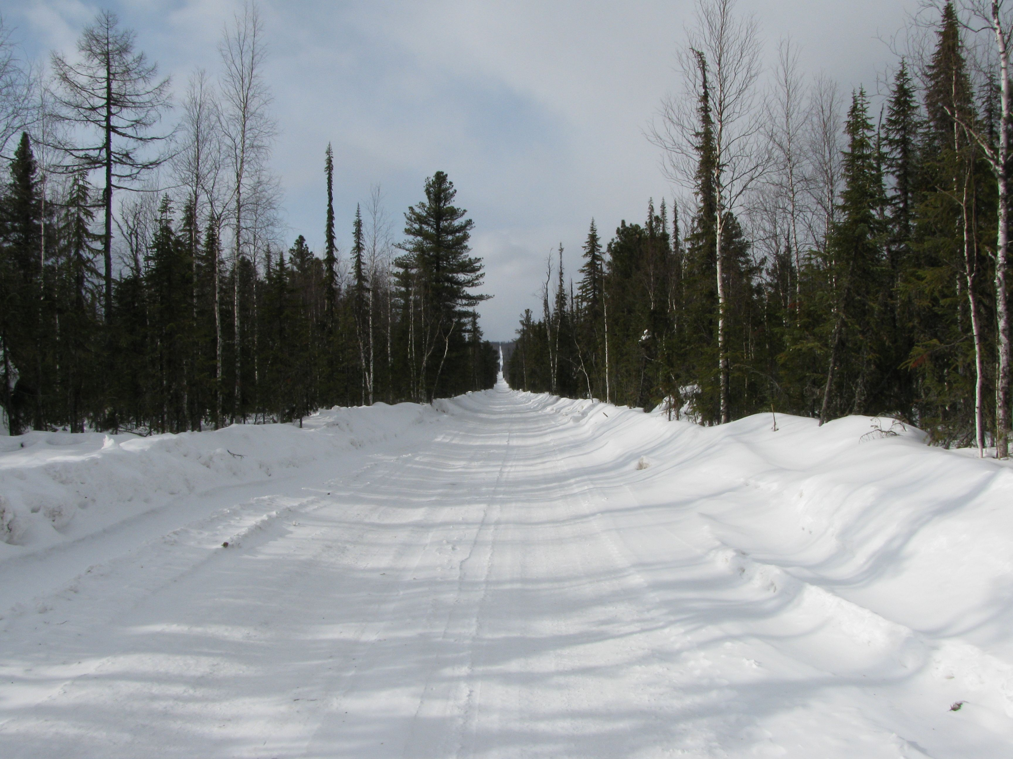 Опять дорога. Судя по перспективе, можно запросто представить себе тамошние расстояния.